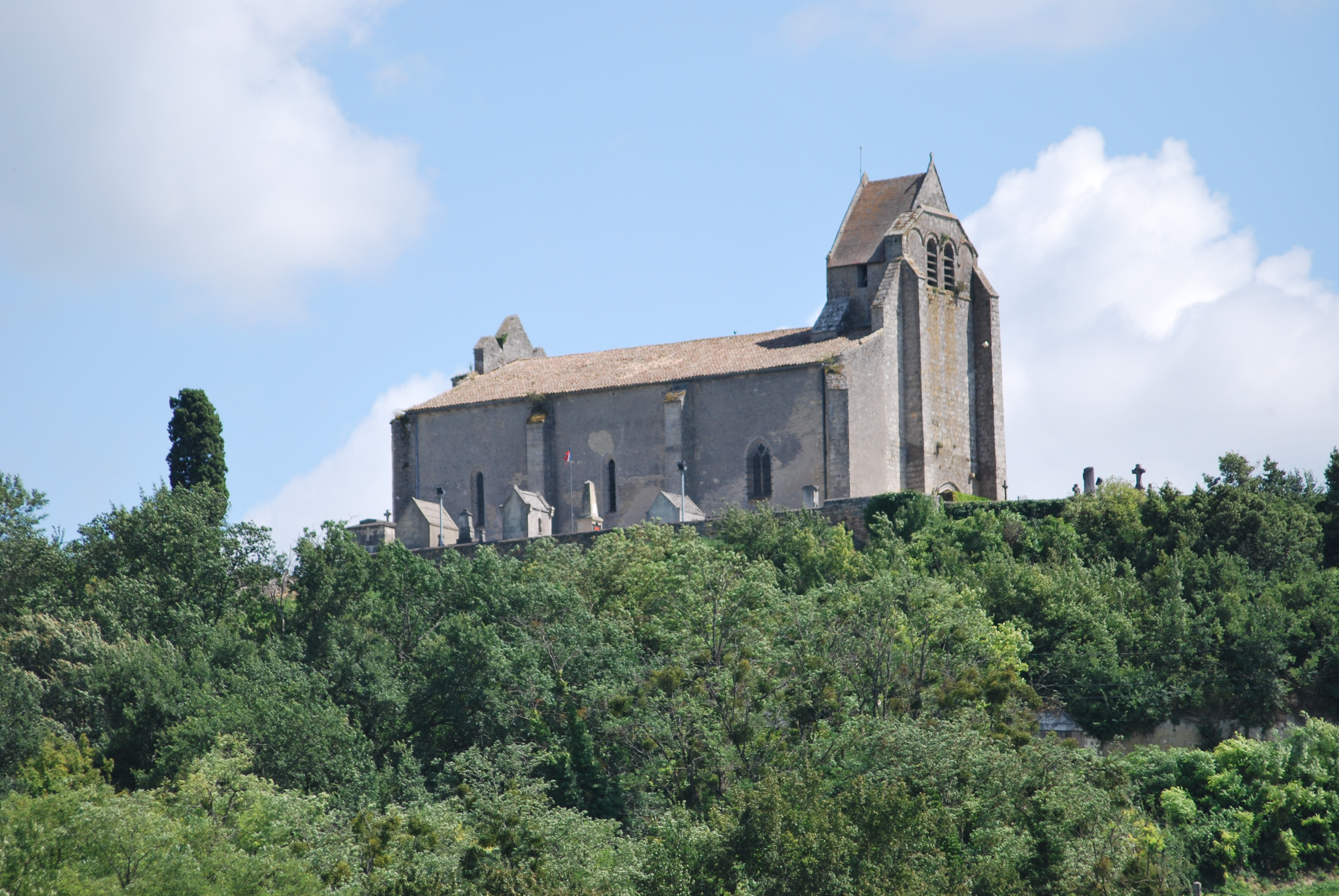 Église Saint-Pierre de Saint-Pey-de-Castets